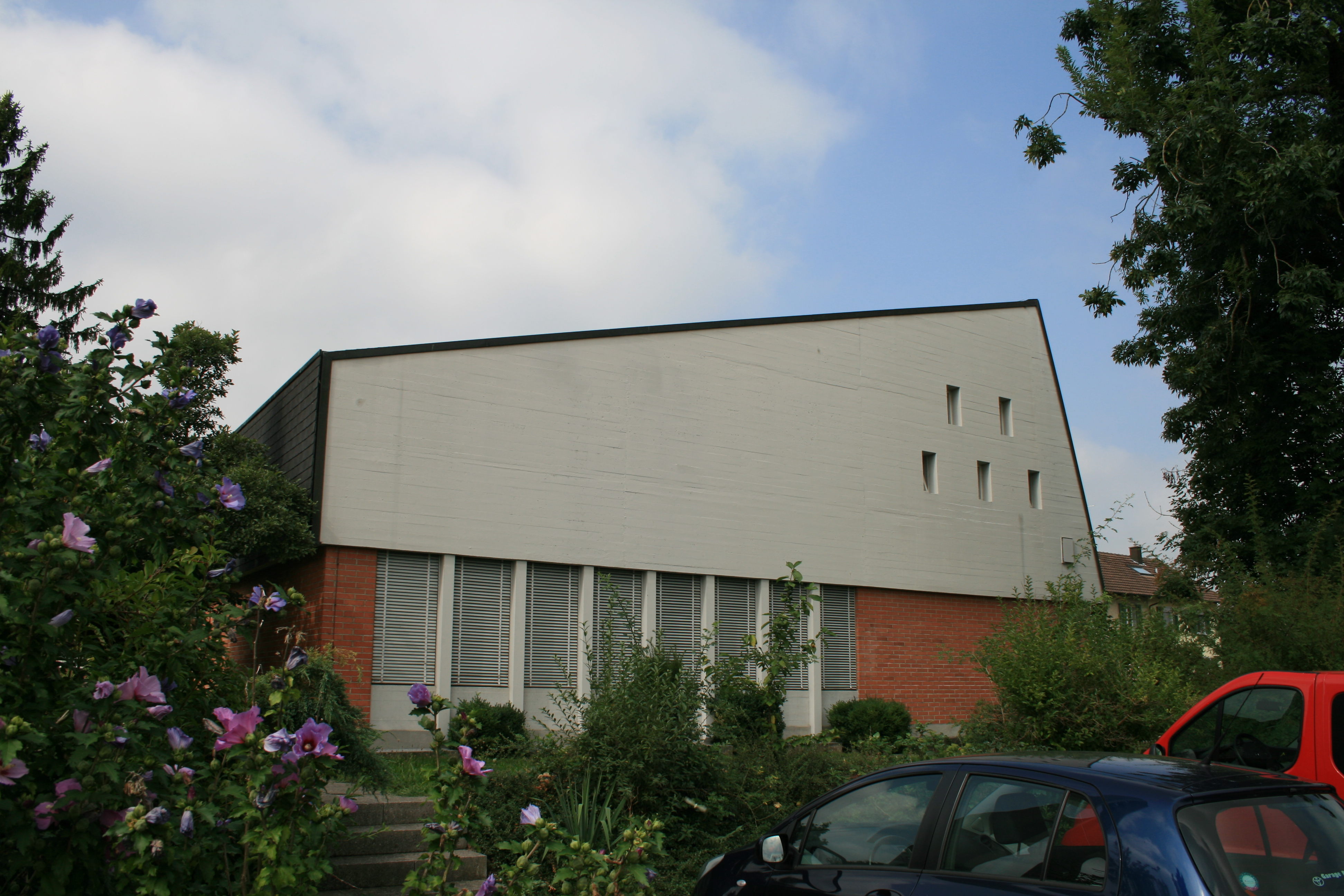 Reformierte Kirche Villmergen